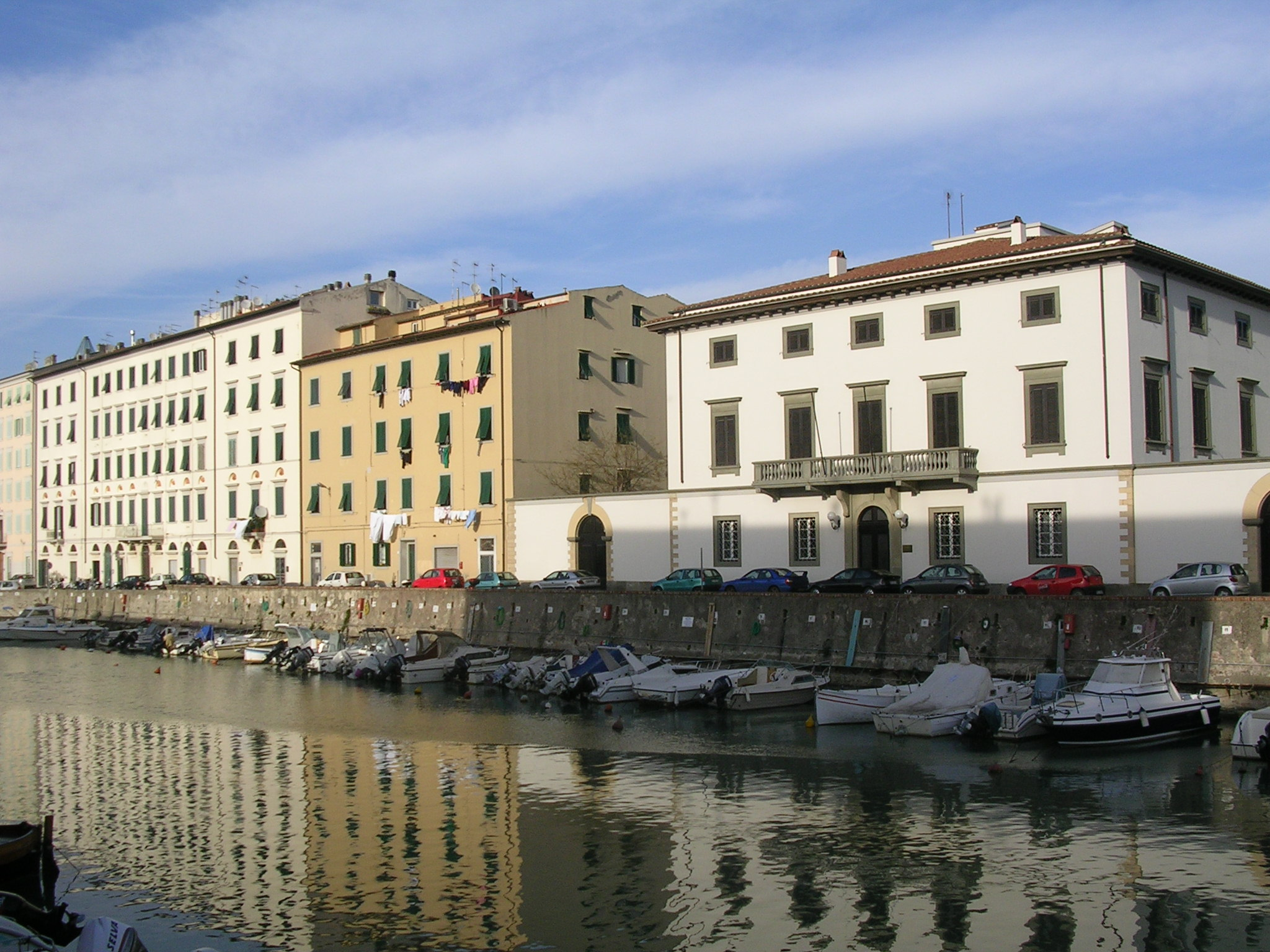 Livorno, edifici sul Fosso Reale, oltre il Rivellino di San Marco: il Palazzo Stub (in primo piano) ed il Palazzo Castelli (a sinistra).